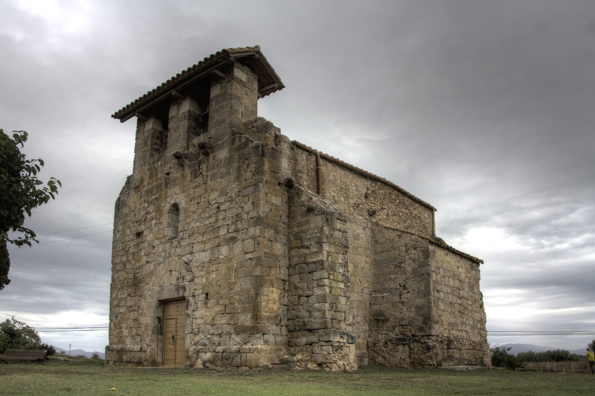 Església fortificada de Santa Maria de Vilamacolum.